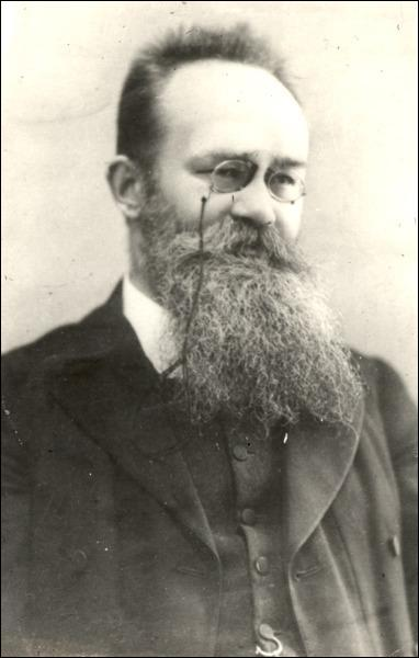 Михайло Грушевський (1866-1934)